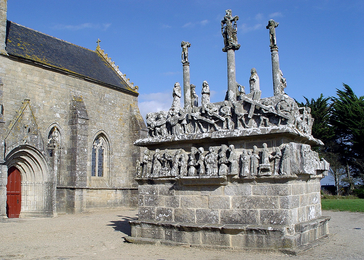 Saint-Jean-Trolimon (Bretagne, Finistère) Calvaire bei der Kapelle Notre-Dame-de-Tronoën, Westseite